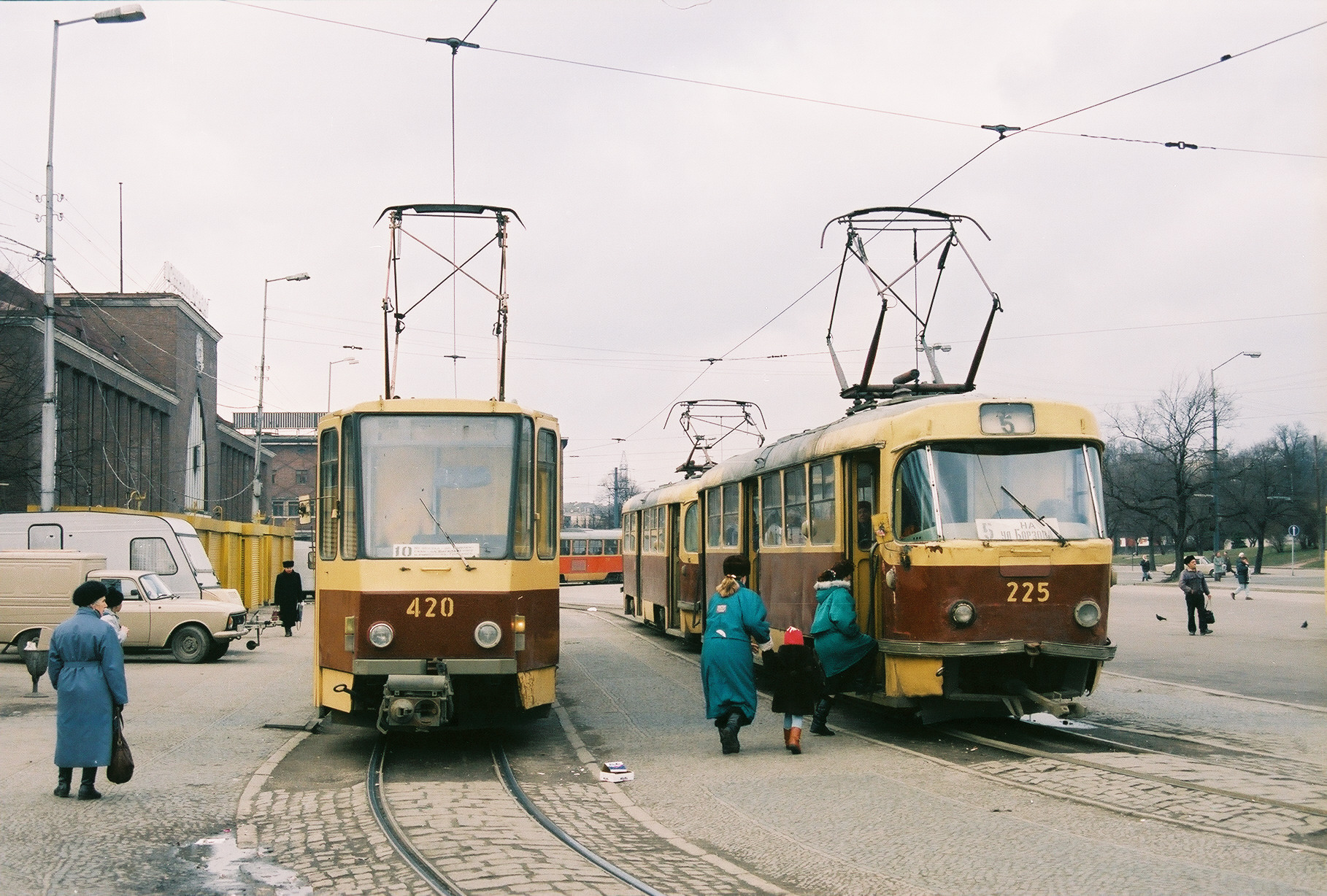 Triebwagen #420 und #225 der Kaliningrader Strassenbahn in der Schleife vor dem nunmehrigen Südbahnhof im Februar 1995. Foto: Henrik Karl Nielsen.